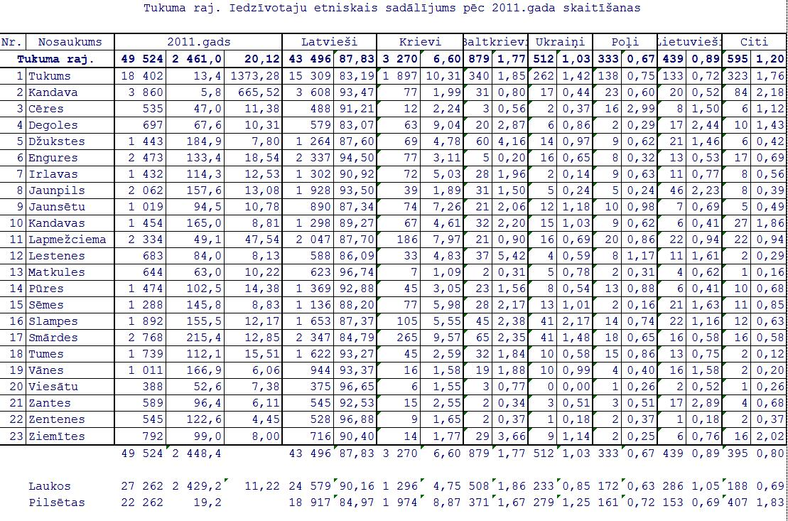 Latvijas 2011 gada tautas skaitīšanas dati